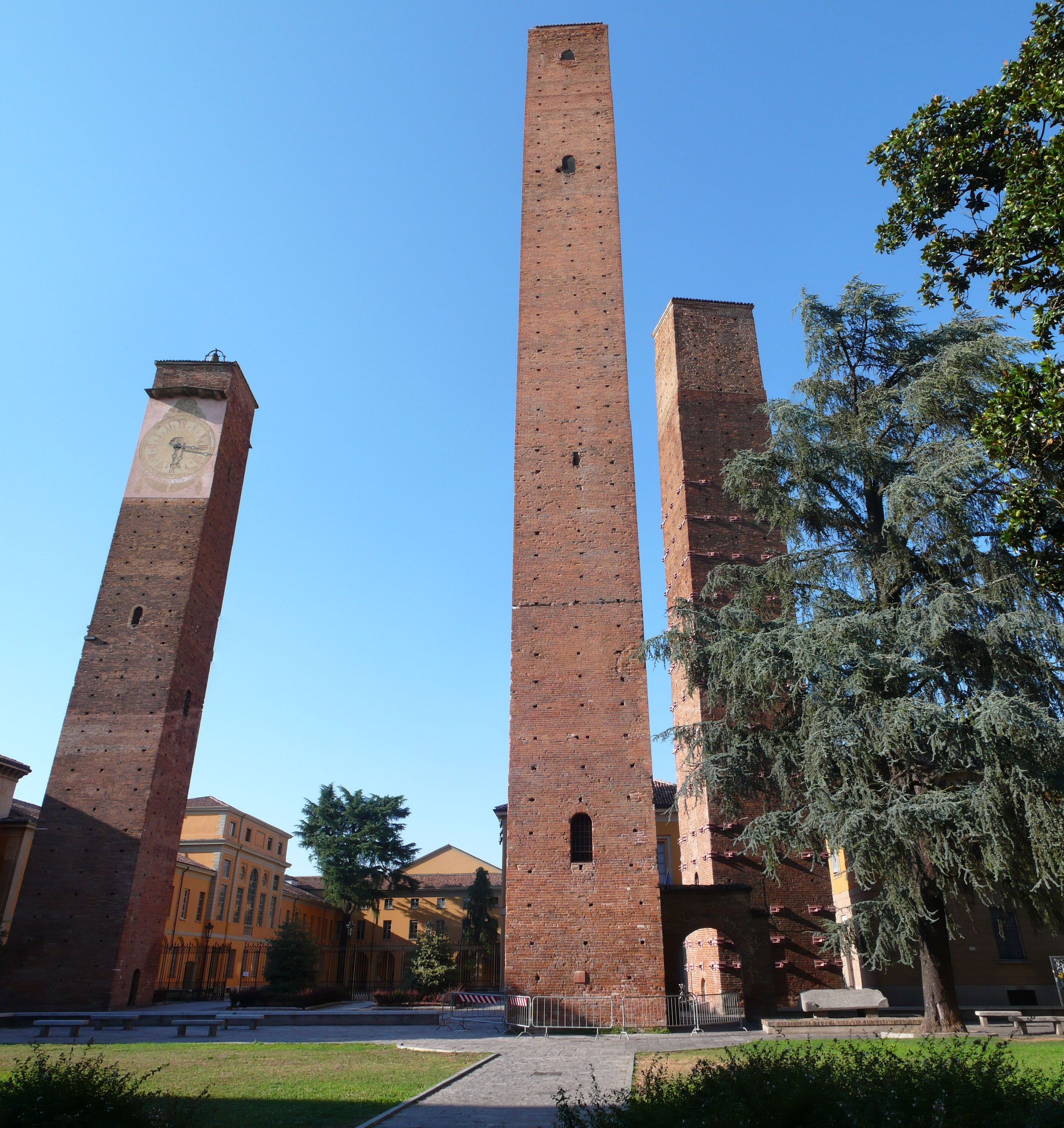 Pavia, Geschlechtertürme (aus drei Bildern)